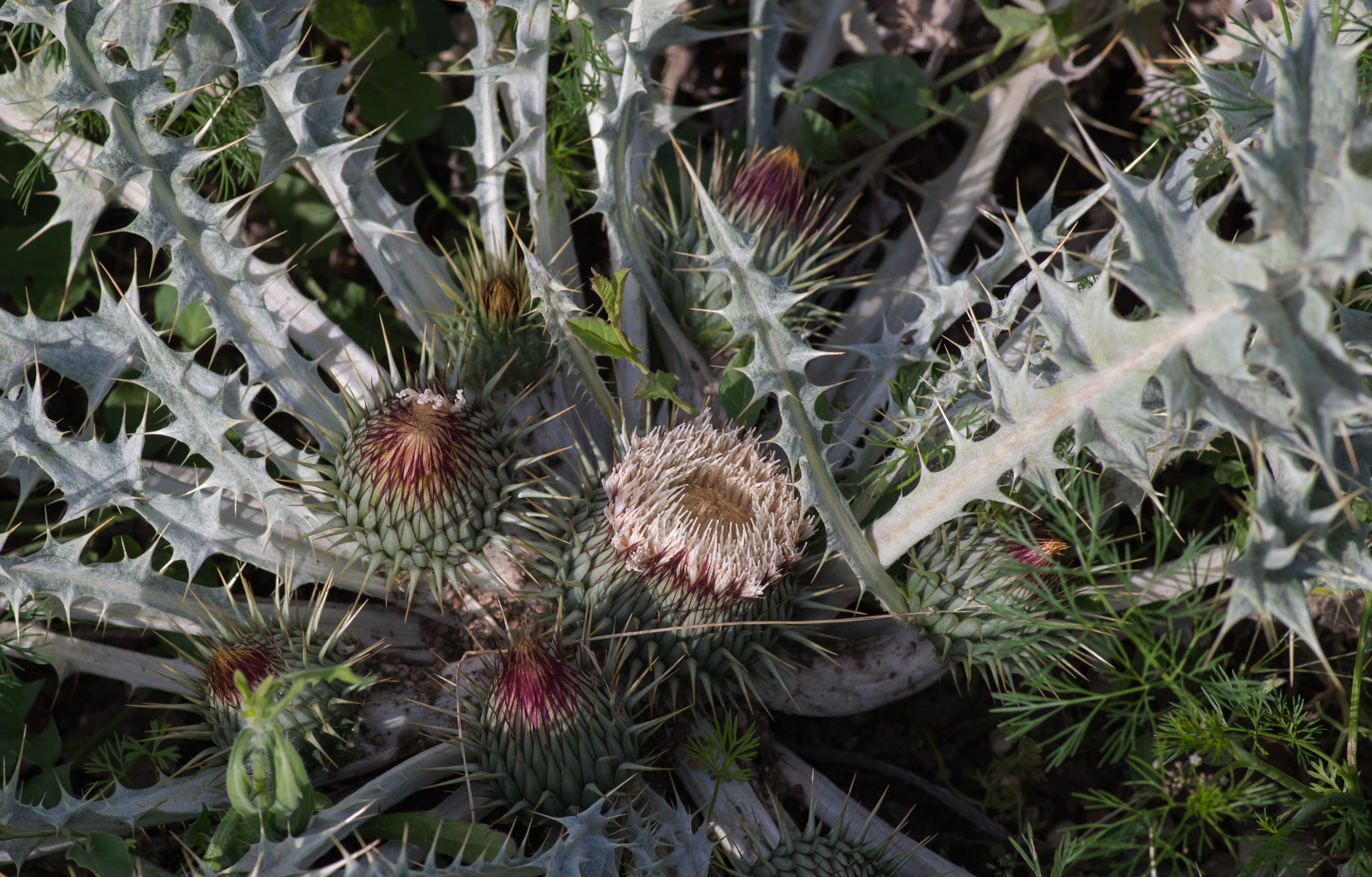 Onopordum acaulon subsp acaulon - Jardin des Plantes (Paris, France)